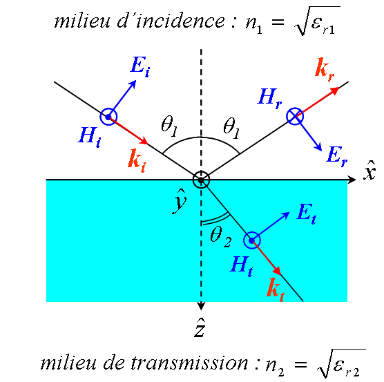 Schéma représentant la réflexion-transmission d'une onde plane électromagnétique lors d'un changement de milieu. Polarisation du champ magnétique transverse au plan d'incidence. Hypothèses sur les milieux : linéaires, homogènes et isotropes.